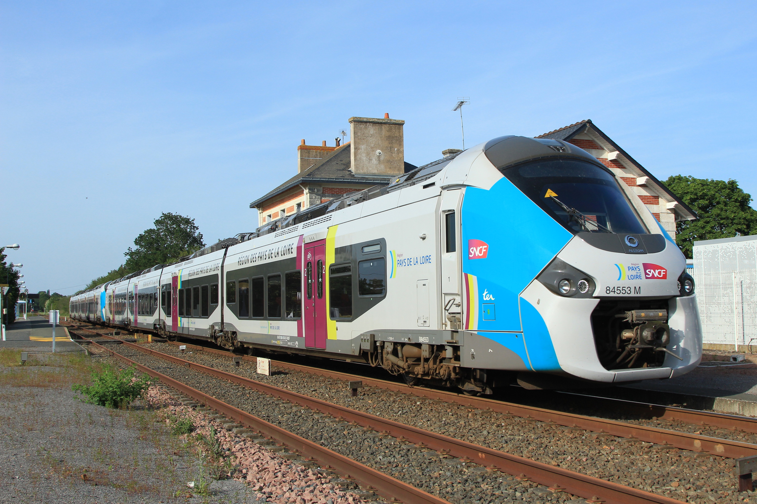 Une UM2 de Régiolis bi-mode (B 84553/4 et B 84547/8) assurant le TER 859373 (Angers 17h58 - Cholet 18h47) repartent de la gare de Chemillé.